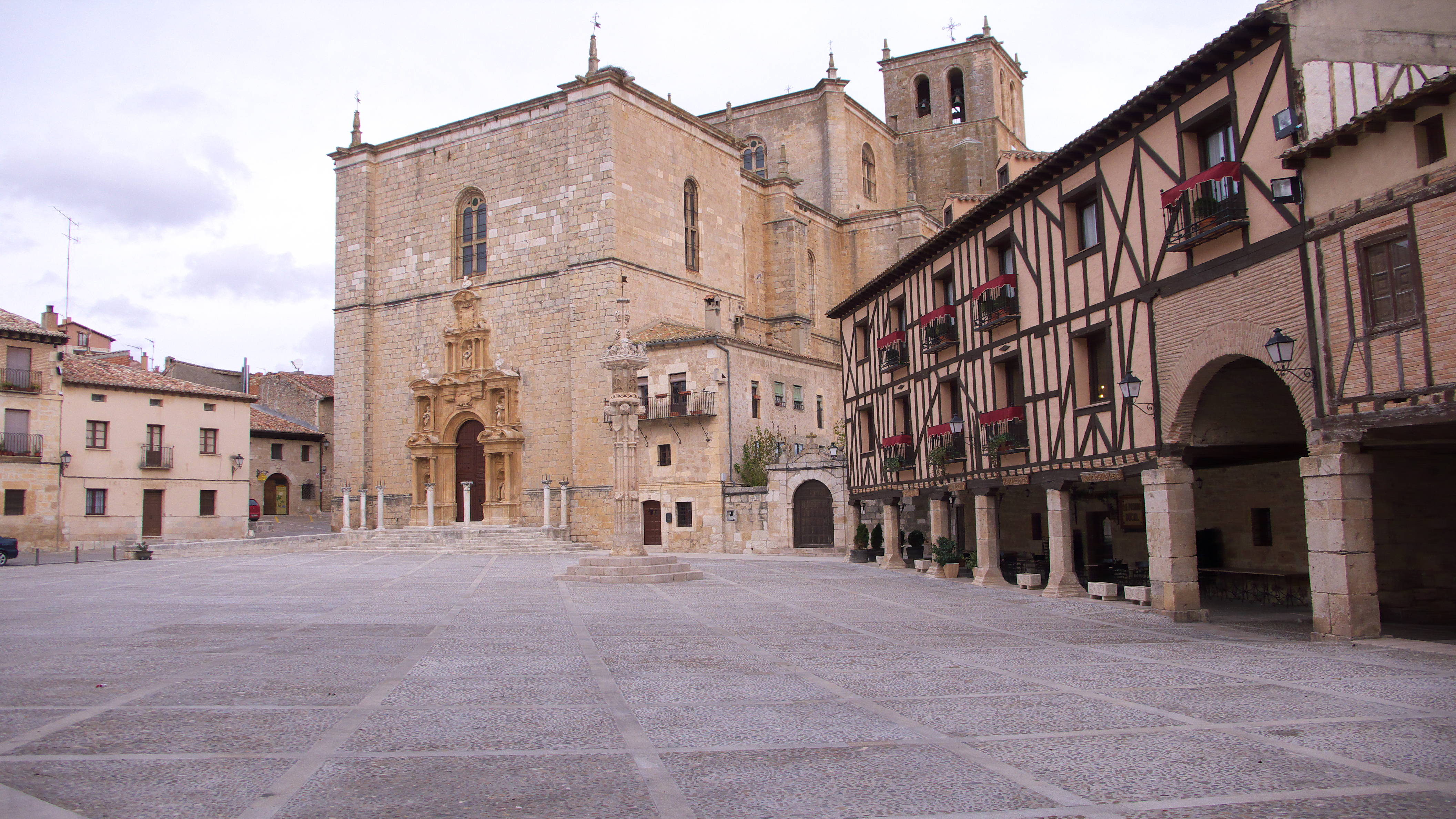 Plaza castellana con interesantes edificaciones, la Colegiata de Santa Ana y la Posada Ducal. Enrique II concede el señorío de Peñaranda a Juan González de Avellaneda.